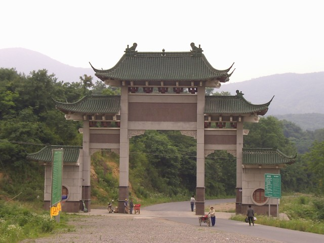 隆昌寺 宝華山ふもとの北大門 2004年6月5日撮影 撮影者：権作 参照：